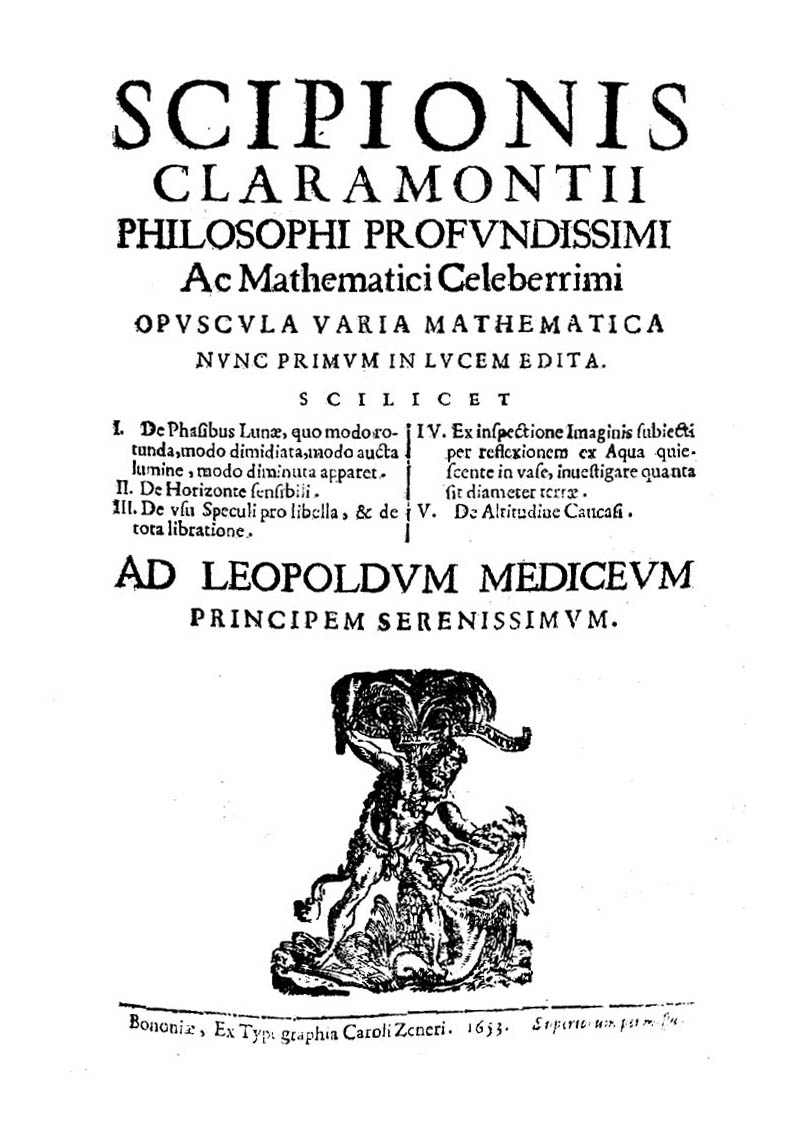 Scipionis Claramontij philosophi ... Opuscula varia mathematica nunc primum in lucem edita. Scilicet 1. De phasibus Lunae ... 2. De horizonte sensibili. 3. De vsu speculi pro libella ... 4. Ex inspectione imaginis subiecti ... 5. De altitudine Caucasi. .... - Bononiae : ex tipografia Caroli Zeneri, 1653. - [12], 328 p. : ill. ; 4º .